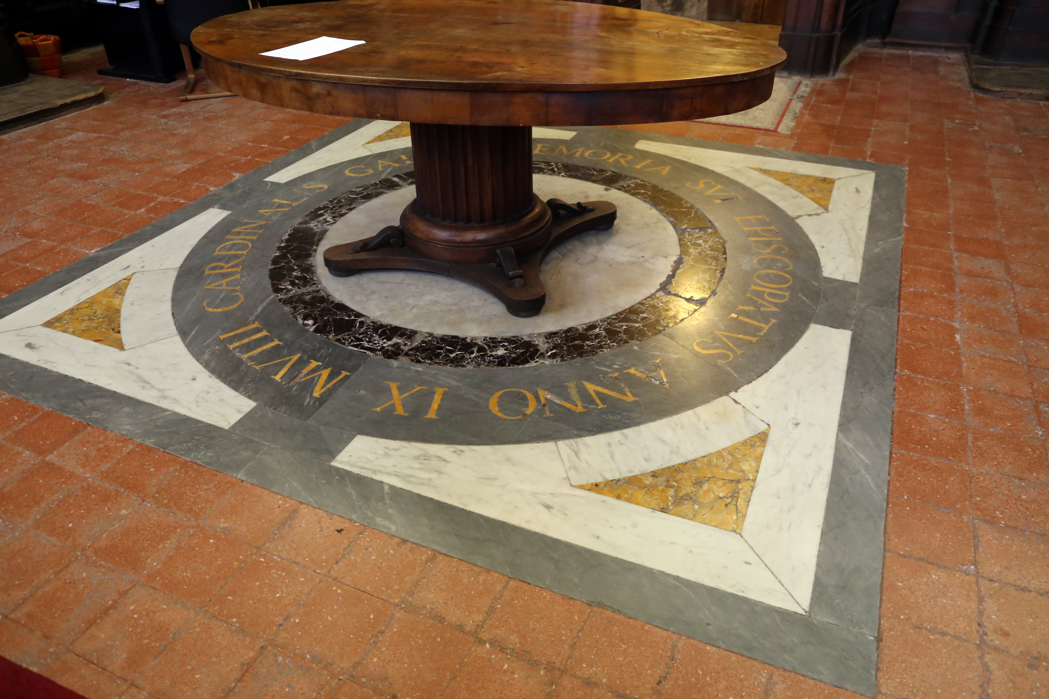 Duomo (Viterbo) - Interior This is a photo of a monument which is part of cultural heritage of Italy.